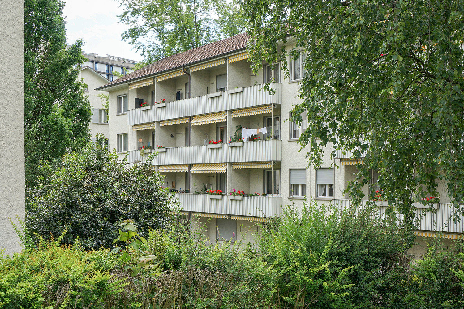 Bern, Siedlung Meienegg, 1949–1955, Hans und Gret Reinhard. Block mit Alterswohnungen